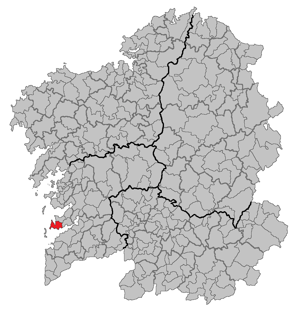 Mapa coa localización do concello de Cangas.